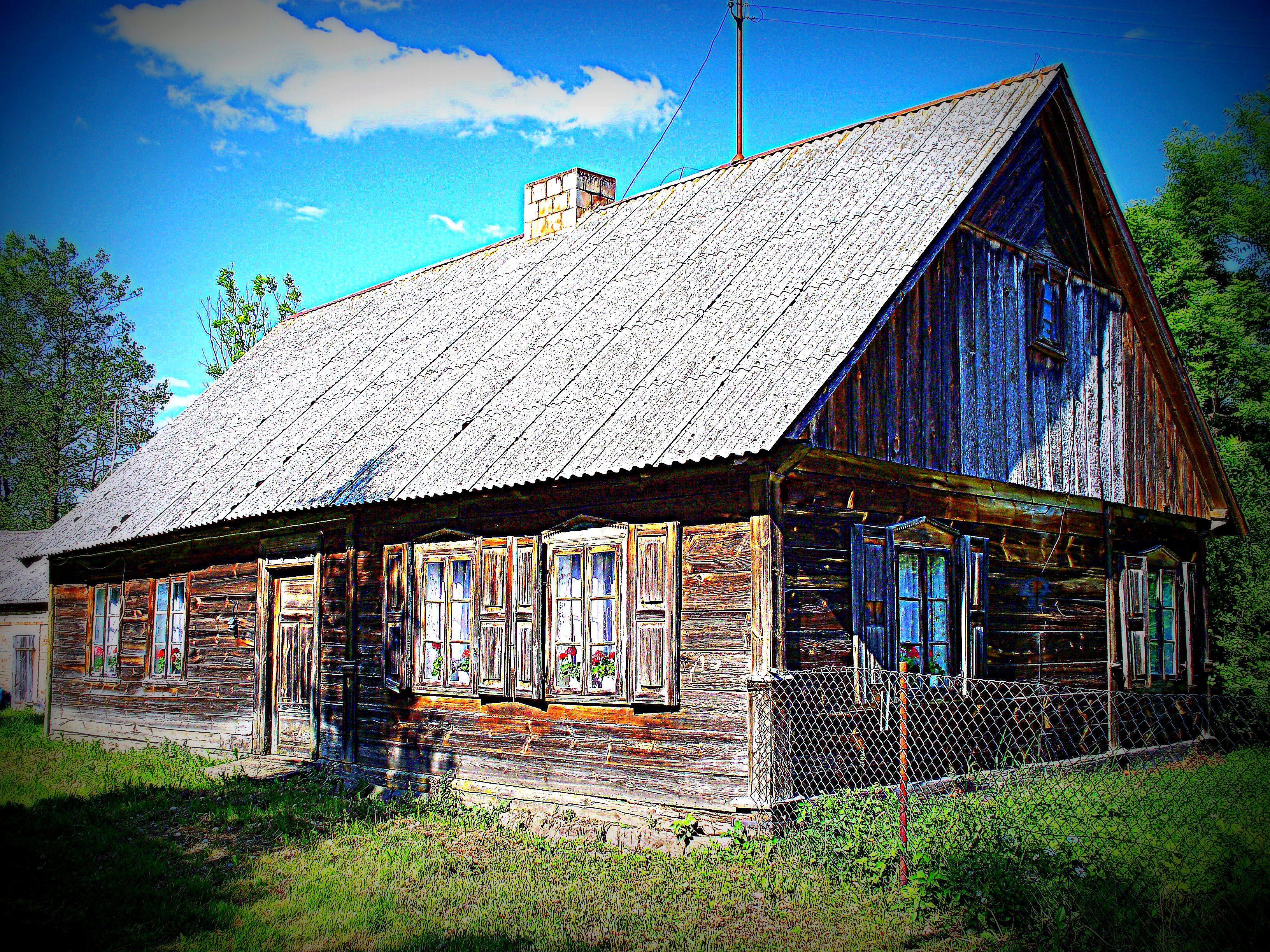 Budynek ten pochodzi z I poł. XX w. W 2008 r. został on wyróżniony w „Konkursie na najlepiej zachowany zabytek wiejskiego budownictwa drewnianego w województwie podlaskim” organizowany przez Urząd Marszałkowski Województwa Podlaskiego i Muzeum Rolnictwa im. ks. Krzysztofa Kluka w Ciechanowcu.